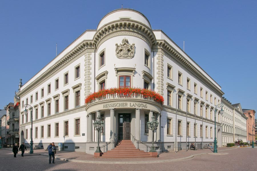 Fassade des Stadtschlosses Wiesbaden, das heute den Hessischen Landtag beherbergt. Auf der rechten Seite schließen sich das Kavaliershaus und der Wilhelmsbau an.